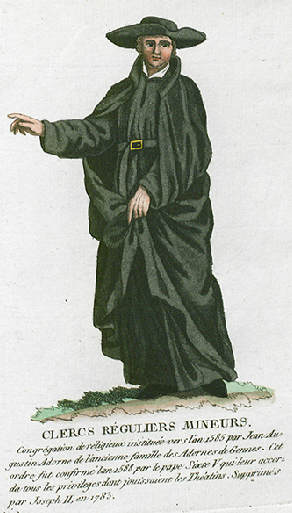 Collection de costumes de tous les ordres monastiques, supprimés à differentes époques, dans la ci-devant Belgique, Bruxelles, Philippe Joseph Maillart et sœur, 1811